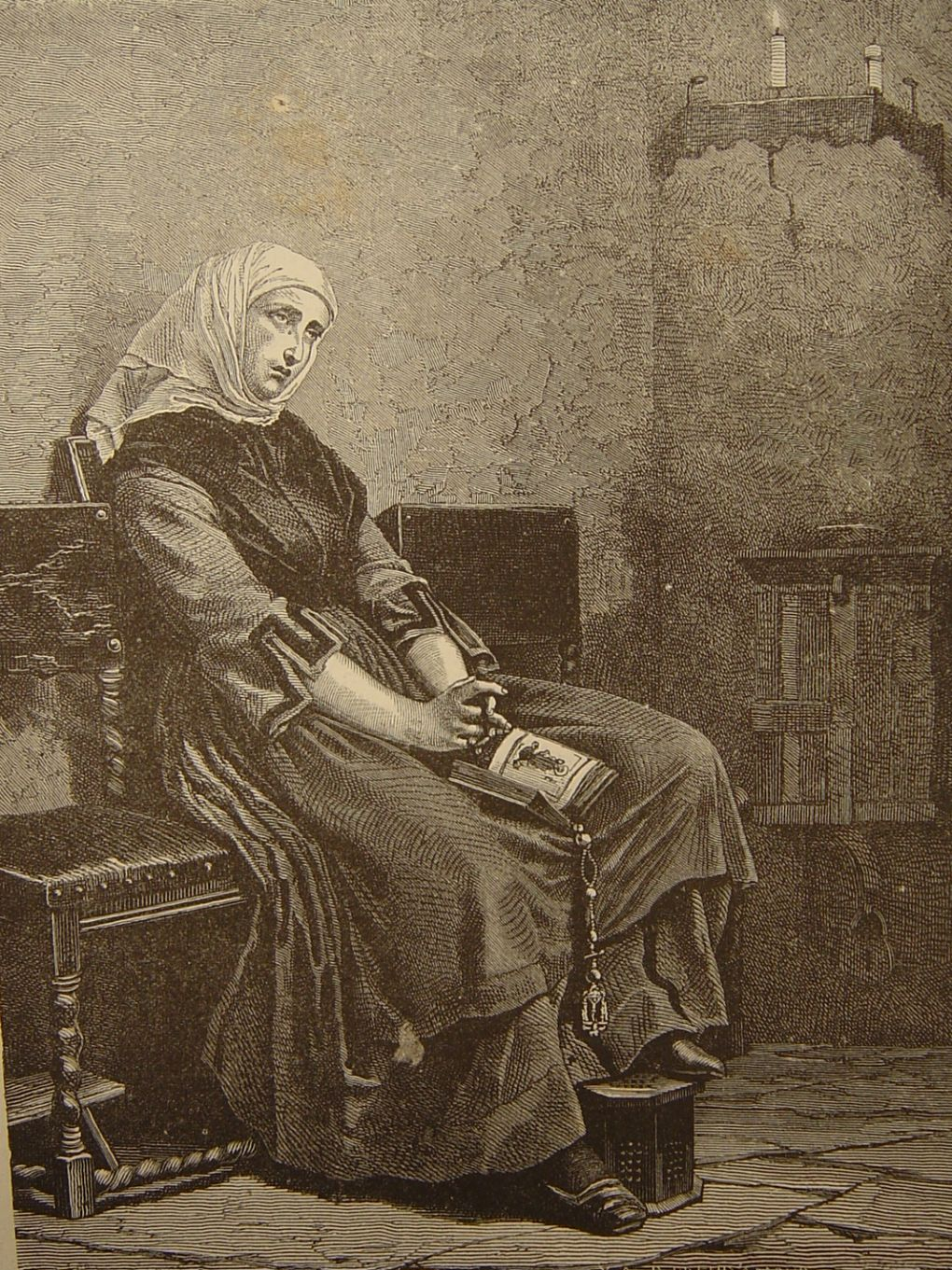 La pauvre mère par Carl Hubner